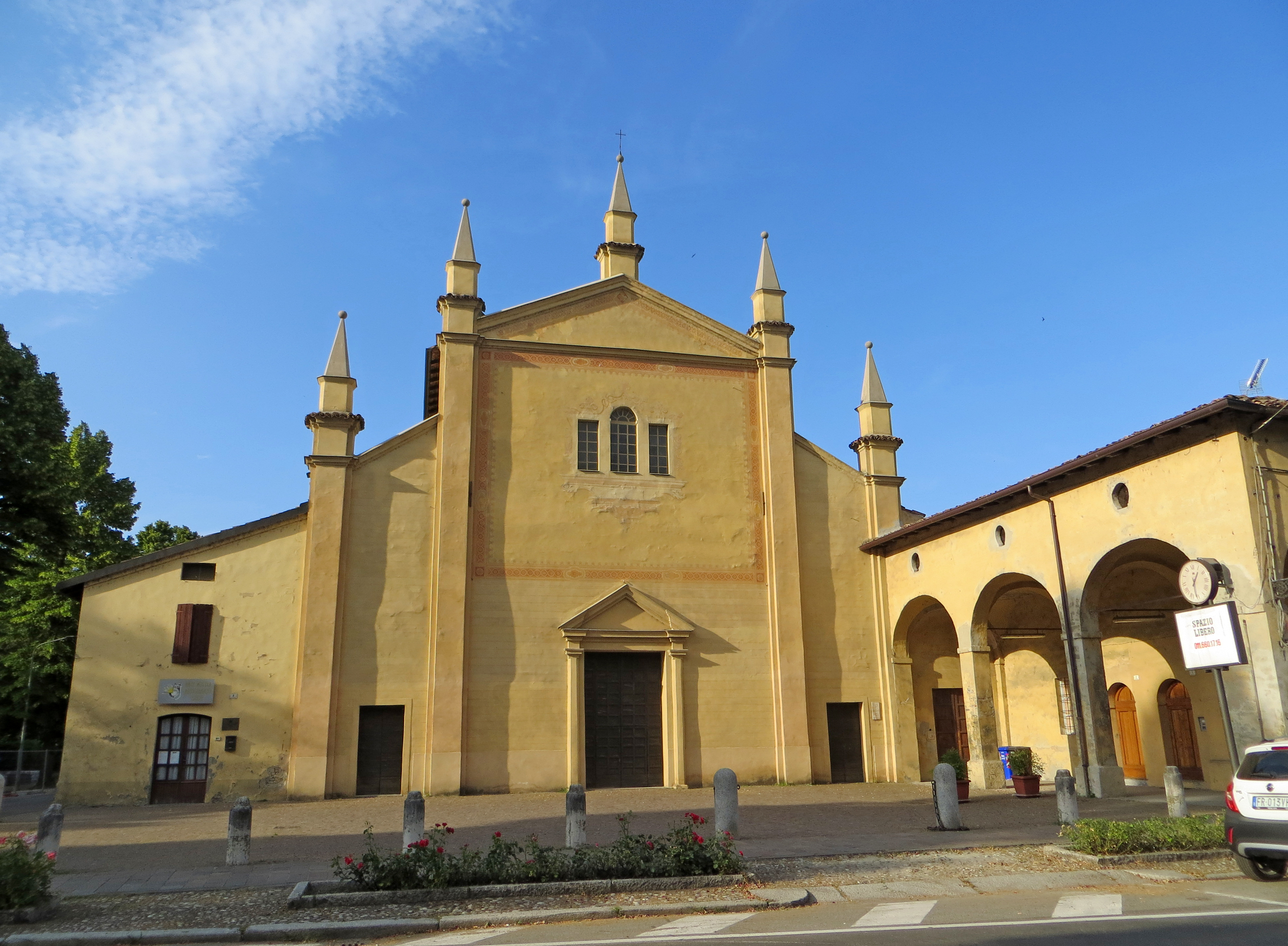 Chiesa della Beata Vergine del Carmine (Soragna) - facciata